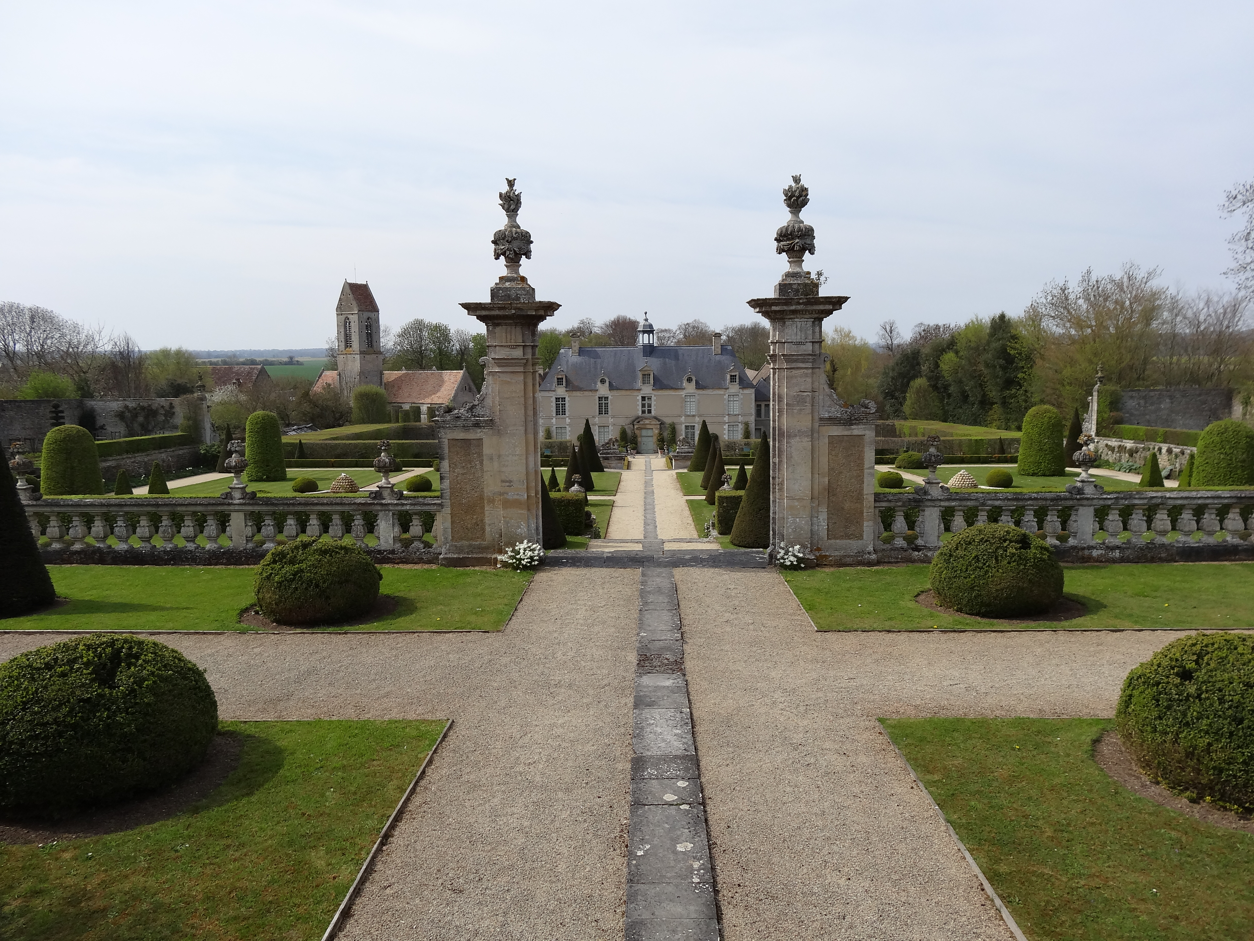 façade sud du logis et église vus de la terrasse des fontaines